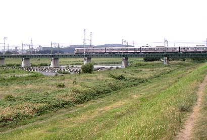 多摩川にかかる京王線中河原駅-聖蹟桜ヶ丘駅間の橋梁。右が府中市、左が多摩市。